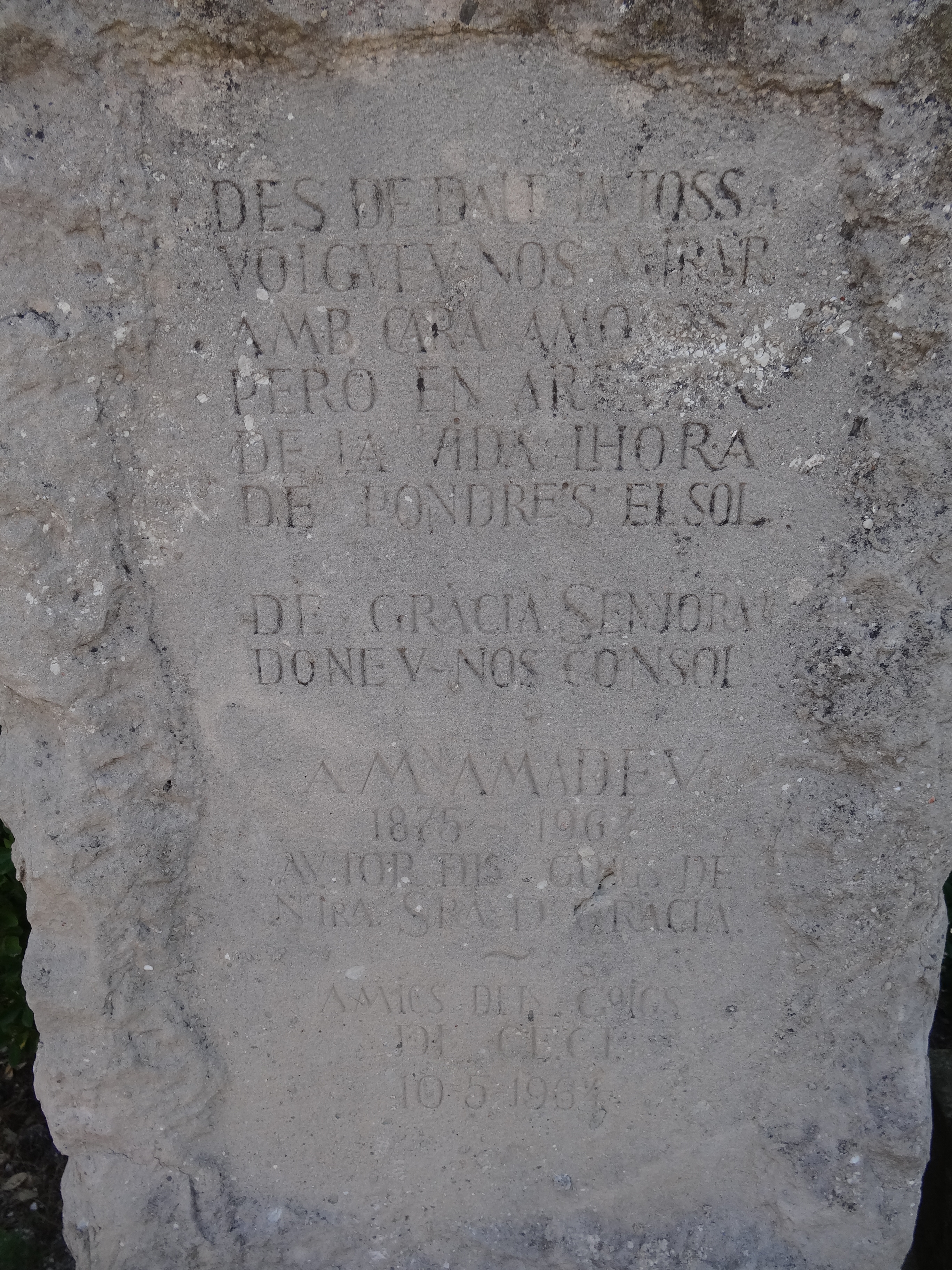 Tossa de Montbui - A Mossen Amadeu Amenós i Roca, autor dels goigs de Nostra Senyora de Gràcia. Amics dels Goigs del CECI (Centre d'Estudis Comarcals d'Igualada).